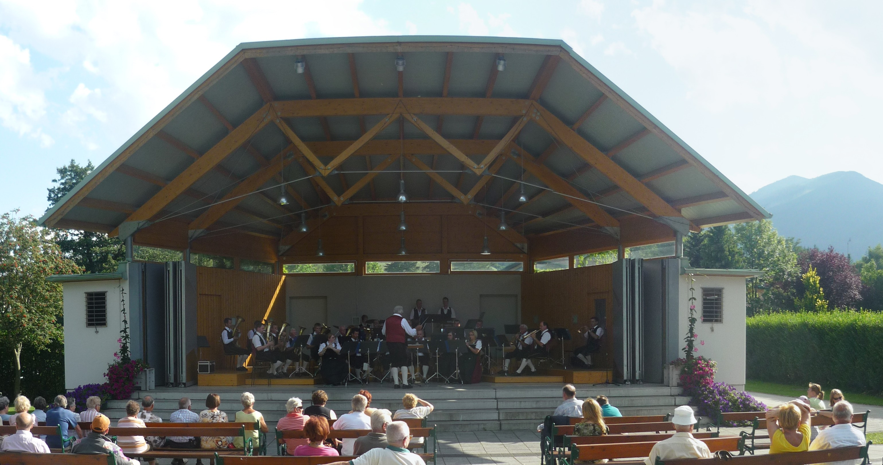 Ein Pavillon im Kurpark der Marktgemeinde Puchberg am Schneeberg, Österreich.